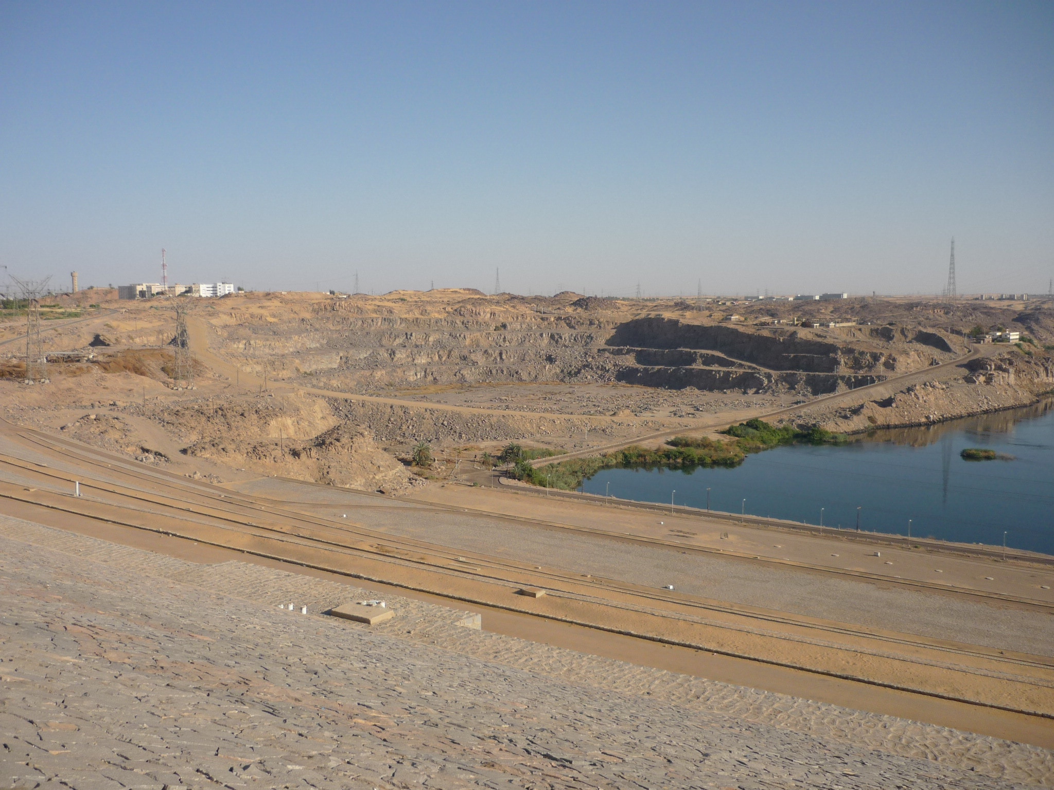 Carrière en aval du haut barrage d'Assouan, Égypte